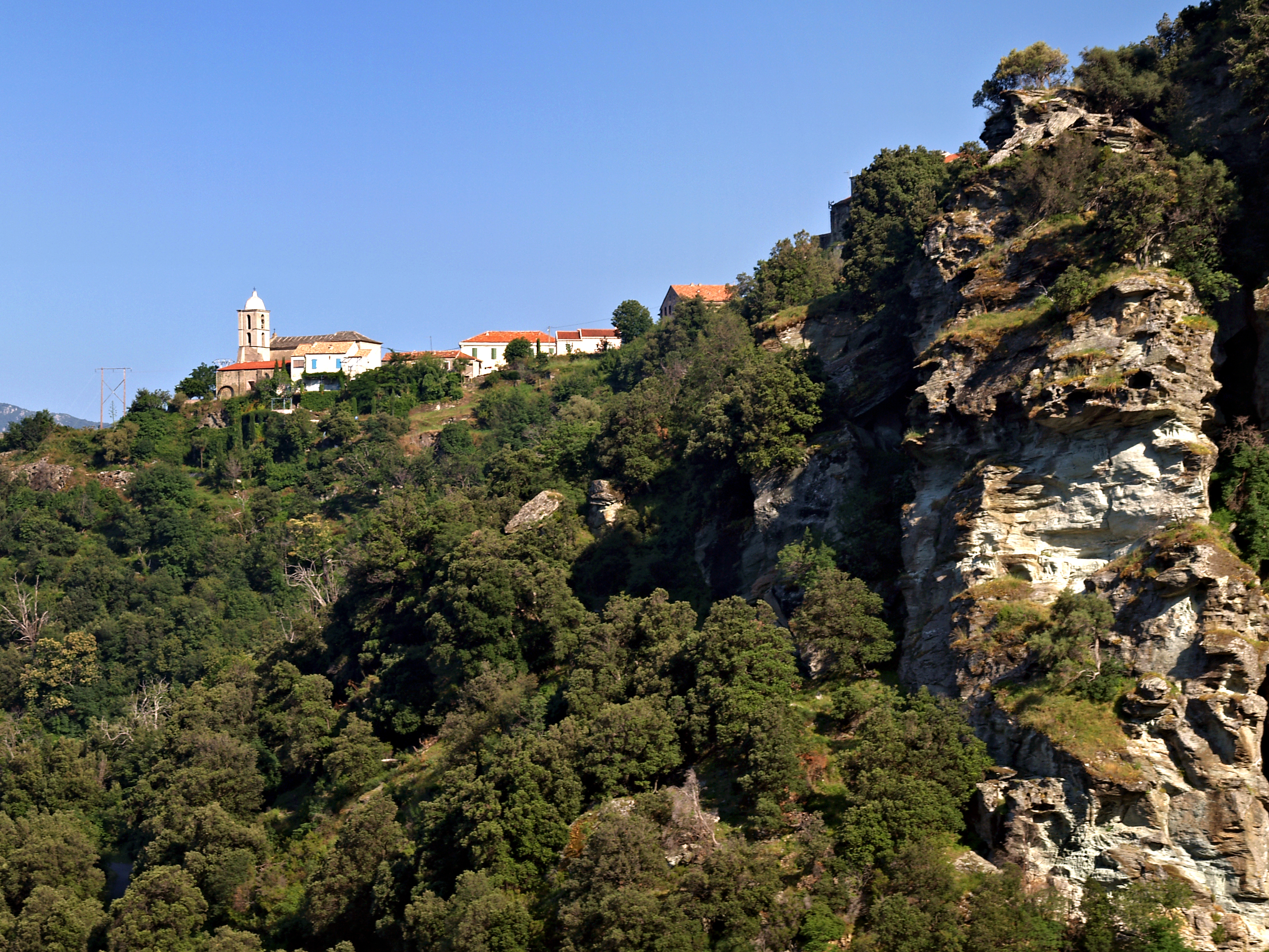 San-Gavino-di-Tenda (Corsica) - Vue du village